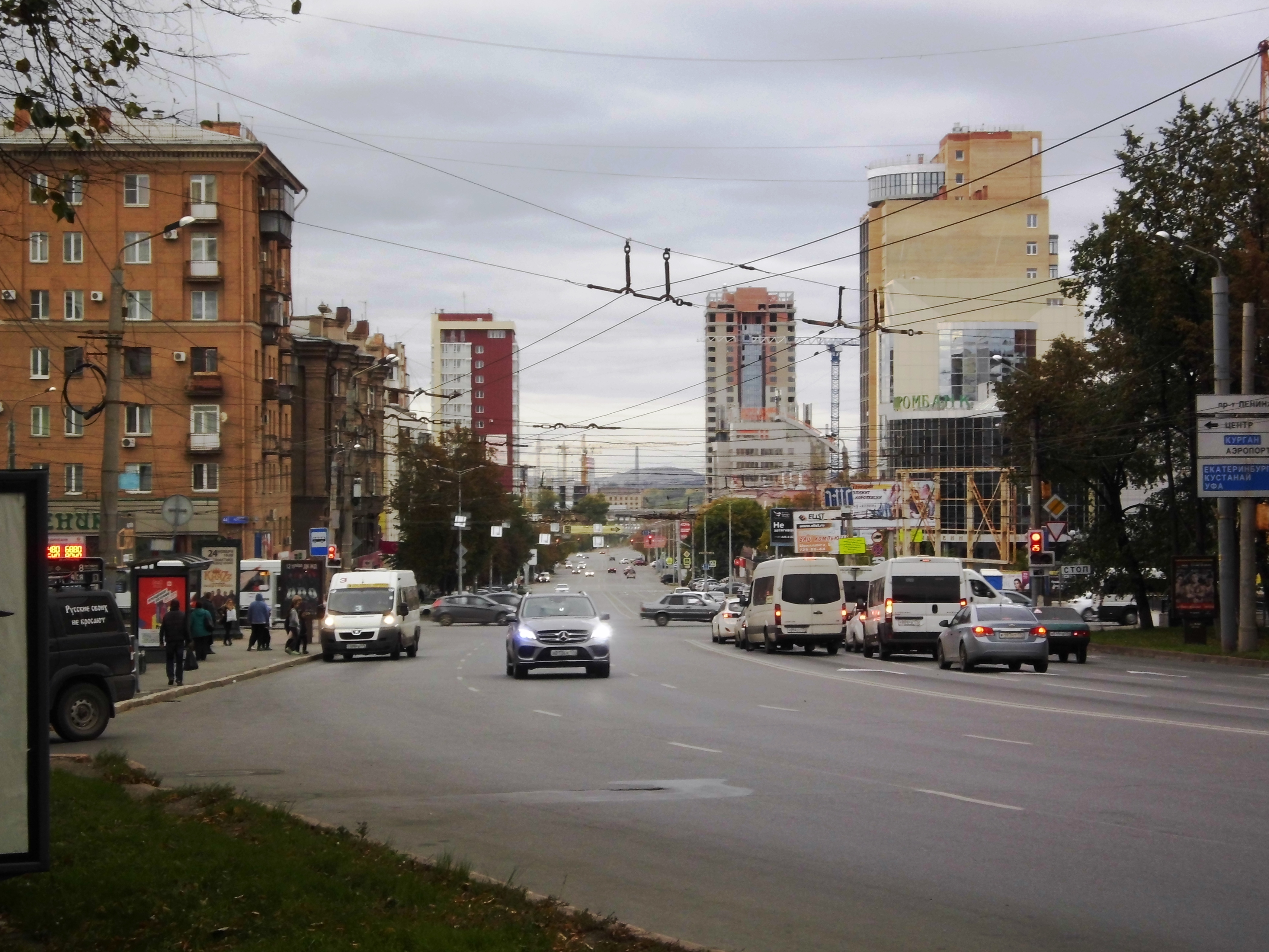 Улица Свободы в Челябинске перед пересечением с проспектом Ленина. Вид в северном (начала улицы) направлении. На дальнем плане пригорок - золоотвалы Челябинского металлургического комбината. Слева на ближнем плане (проспект Ленина 44/Свободы 66) дом в котором жил Белостоцкий И. С.